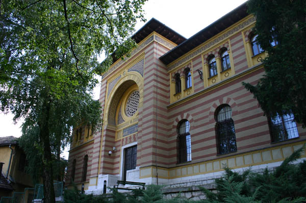 Fakultet islamskih nauka u Sarajevu